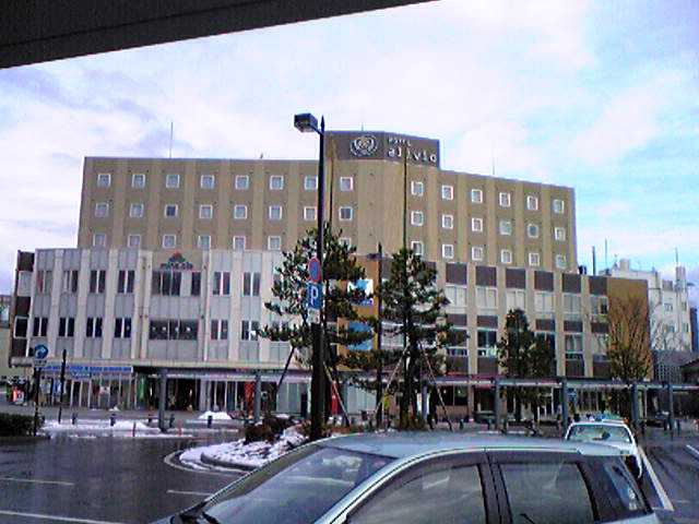 minacle